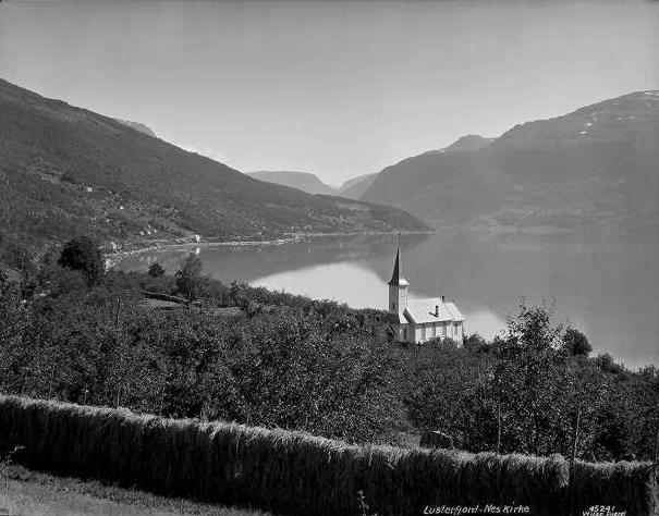 Nes kyrkje i Luster i Sogn. Fjorden er Lustrafjorden